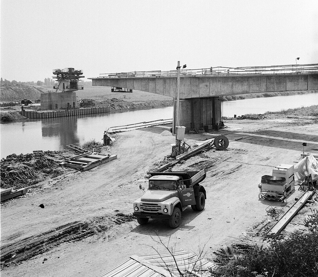 A körösladányi Sebes-Körös-híd építése 1979-ben